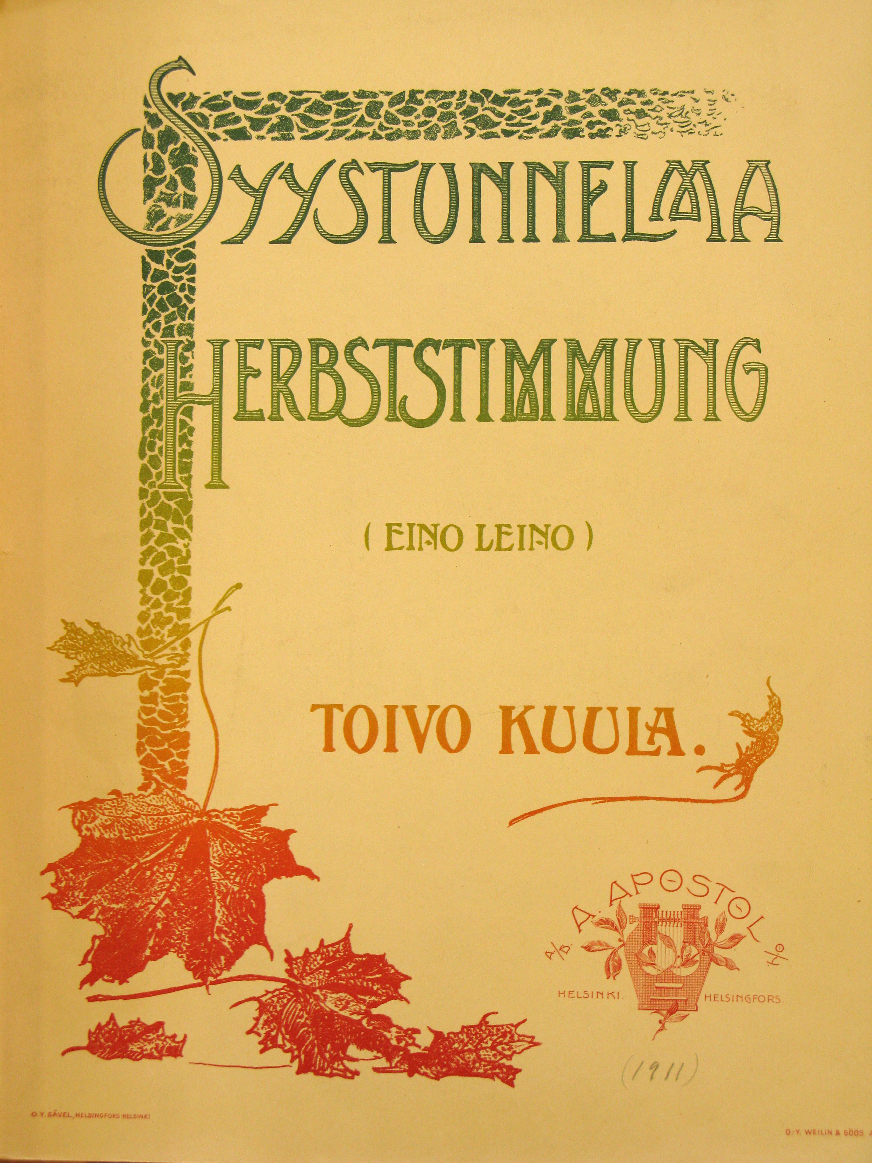 Toivo Kuulan sävellys Eino Leinon runoon Syystunnelma ilmestyi nuottina 1911.